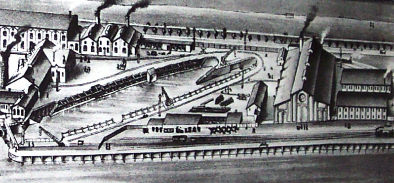 NDL, Technischer Betrieb mit Trockendock in Bremerhaven mit Versuchsanstalt